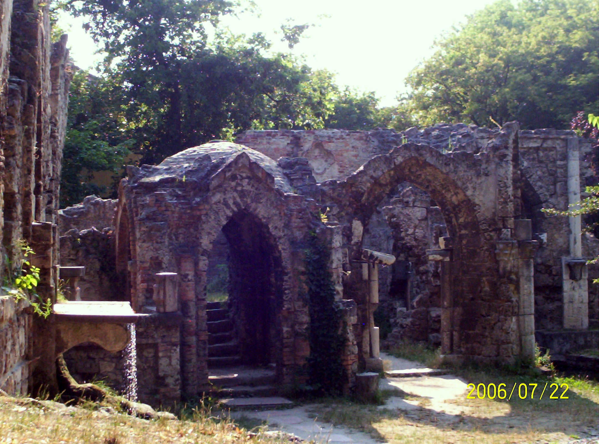 Tata, angolpark